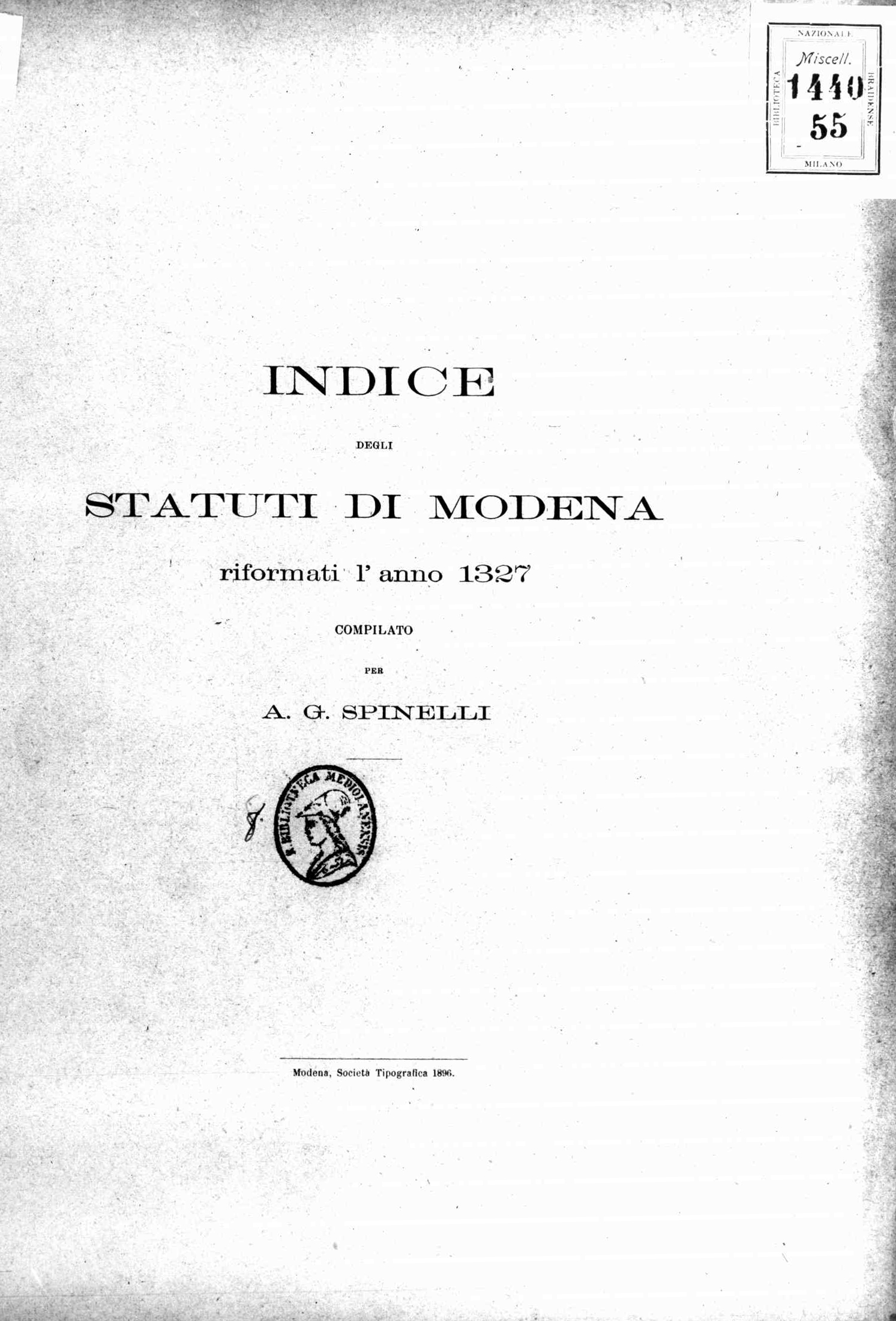 Frontespizio